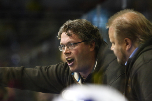 Mika Toivola, coach of Pelicans